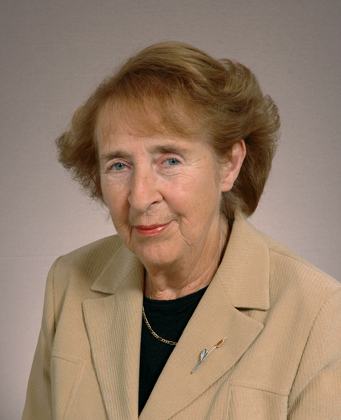 Senator Anna Kurska